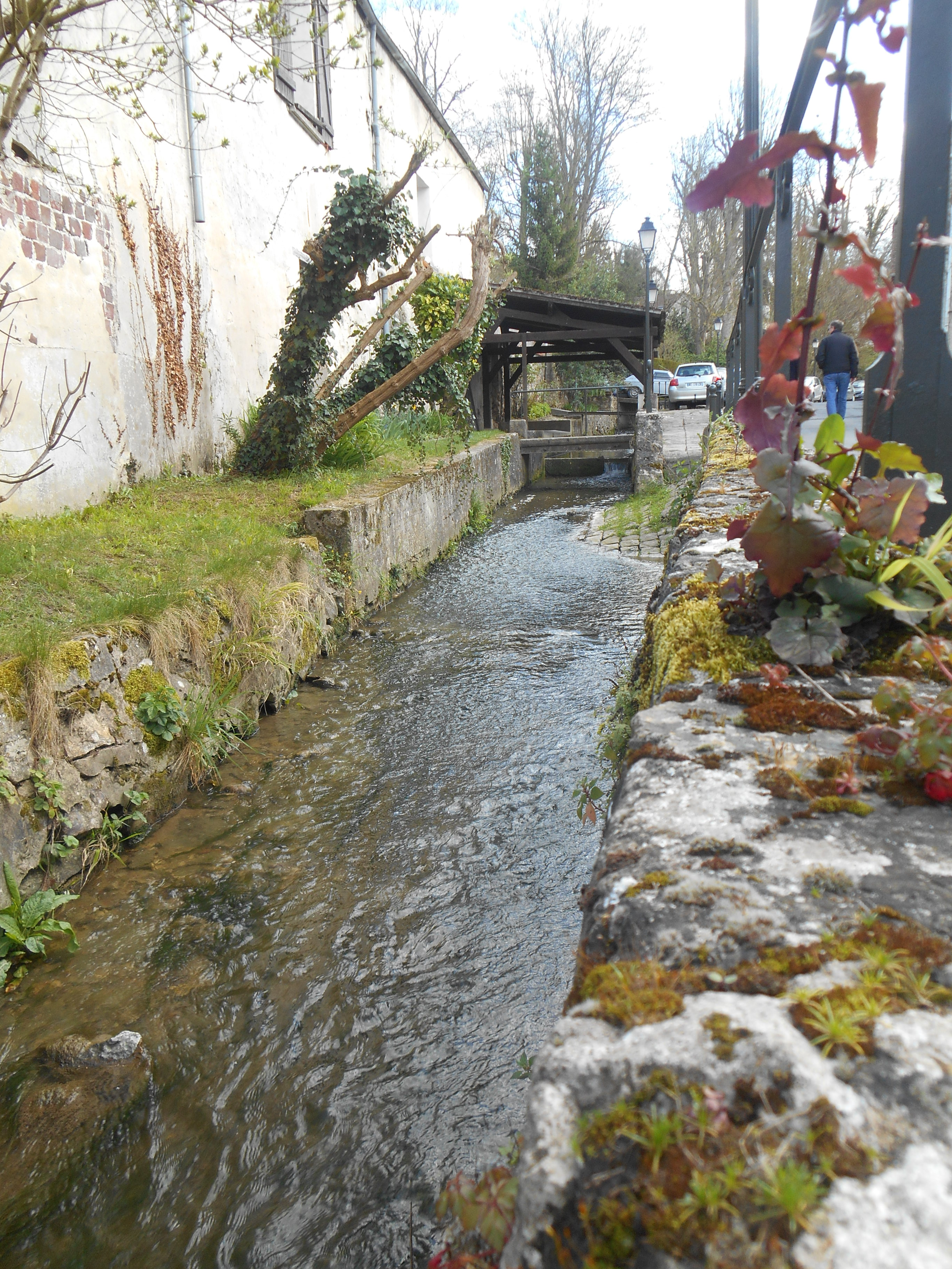 Ruisseau à Coupvray (77)